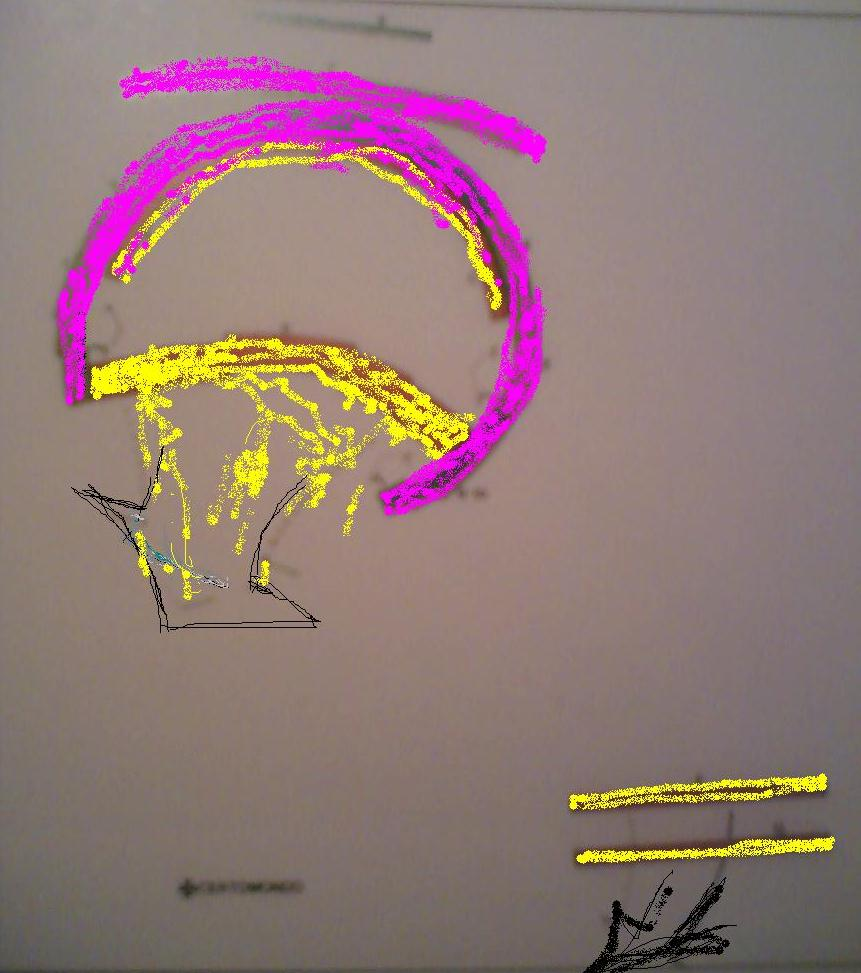 libera commons di carlomarinobuttazzo i guelfi chiudono pubblico dominio ). Template Creative Commons BY-SA